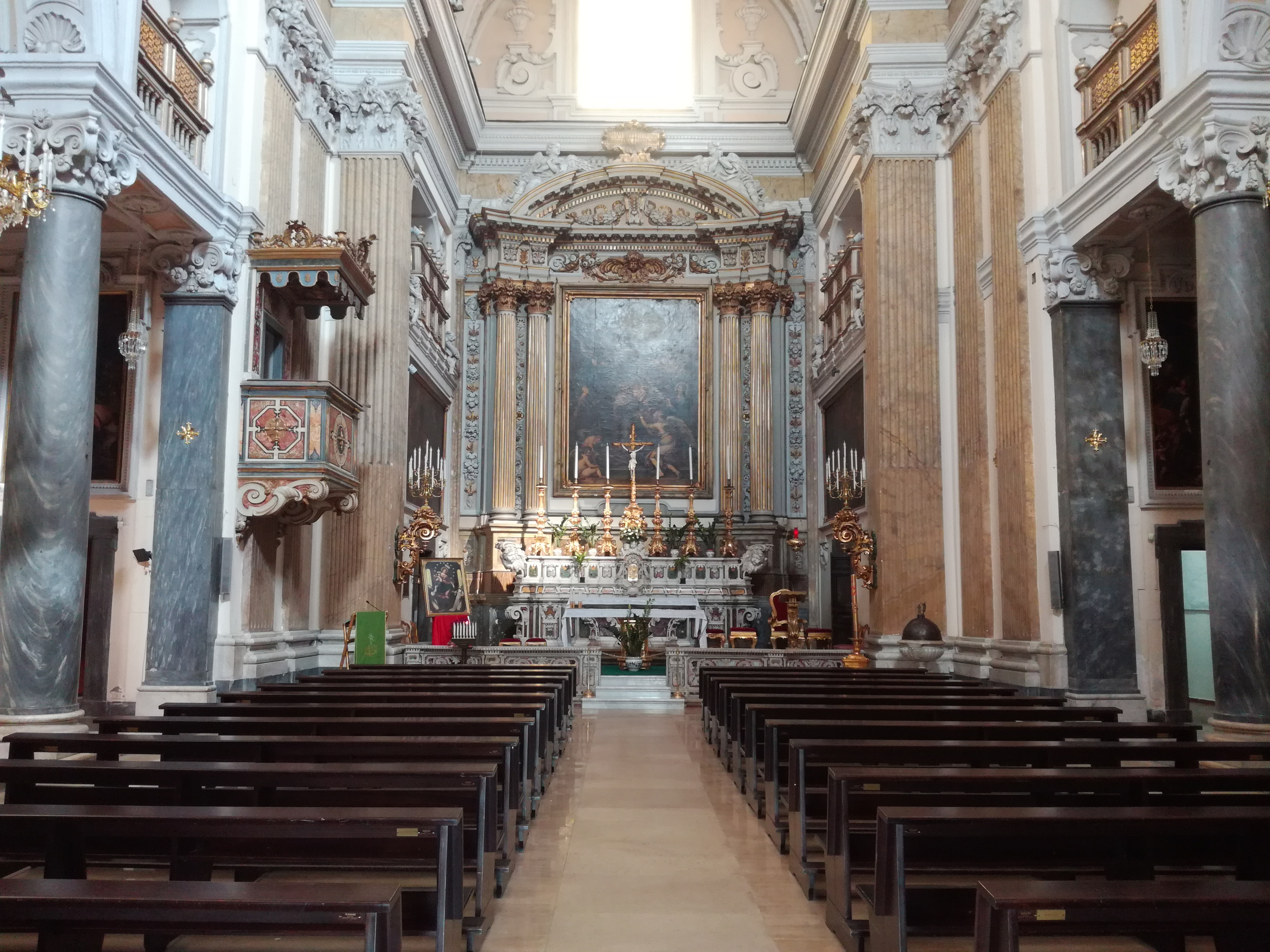 Interno San Giuseppe a Chiaia (Napoli)